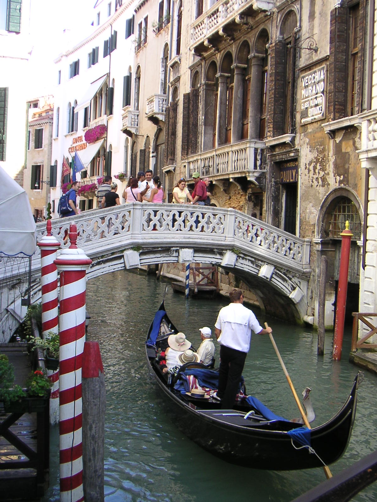 ponte dei consorzi venise